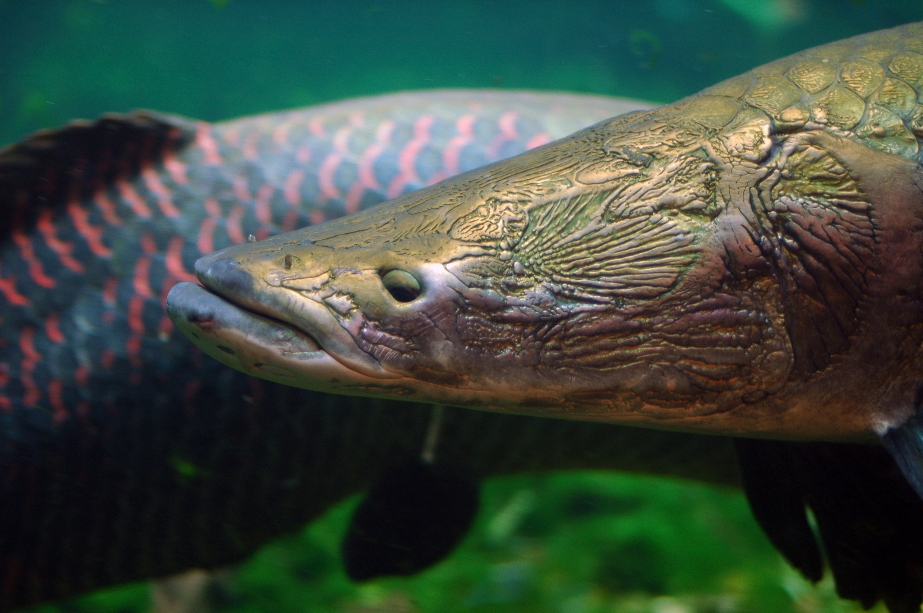 Arapaima